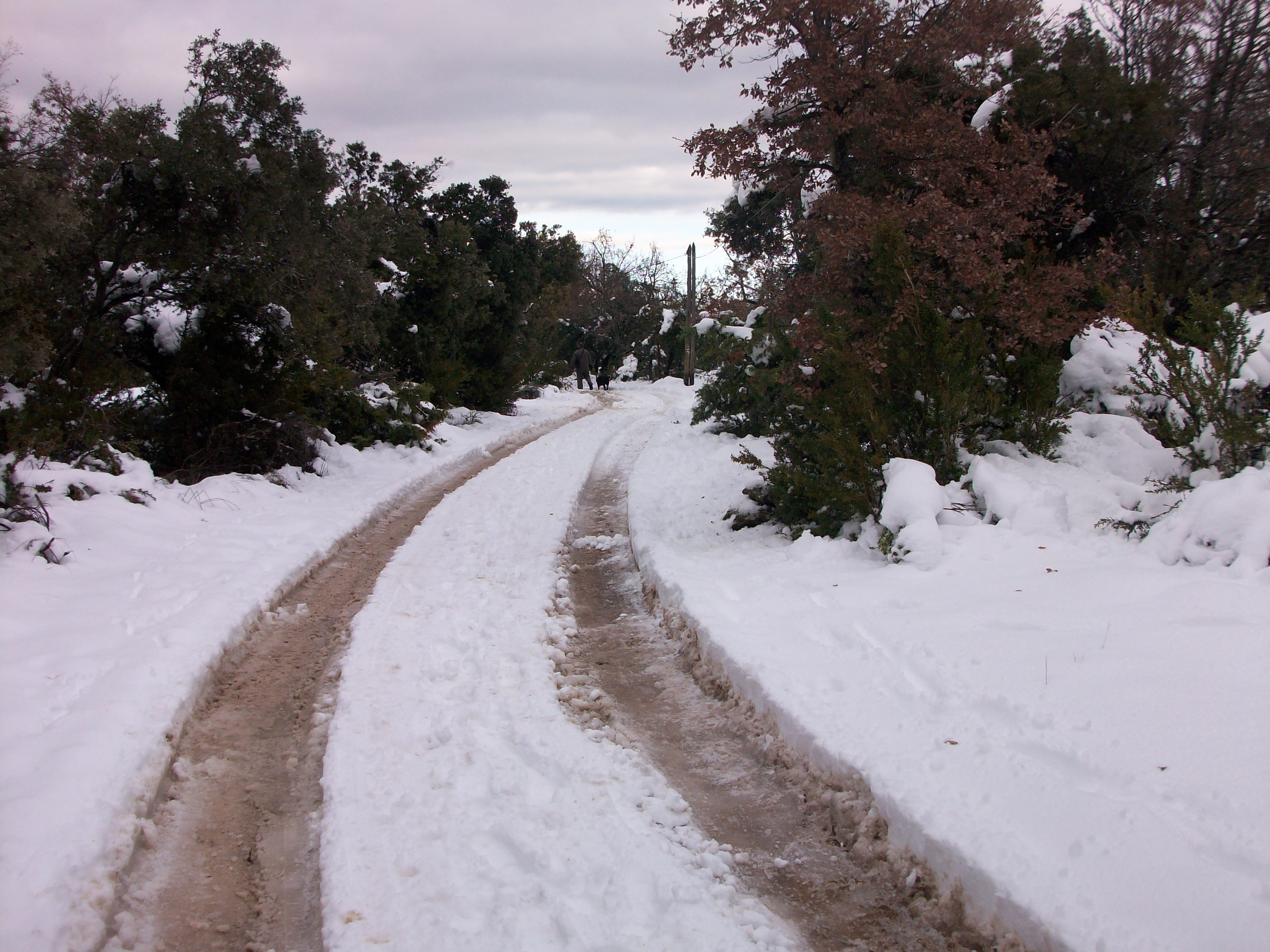 Neige au col du pointu entre Lourmarin et Apt dans le Vaucluse.